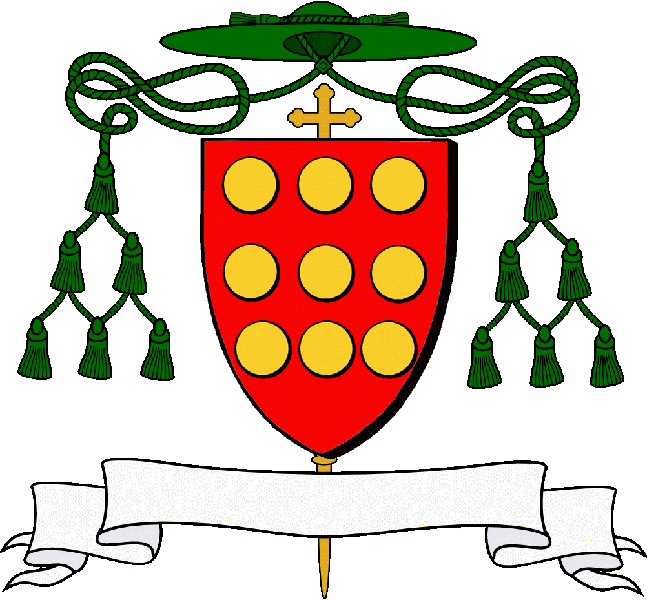 En gwad e nav bezantenn en aour, 3, 3, 3